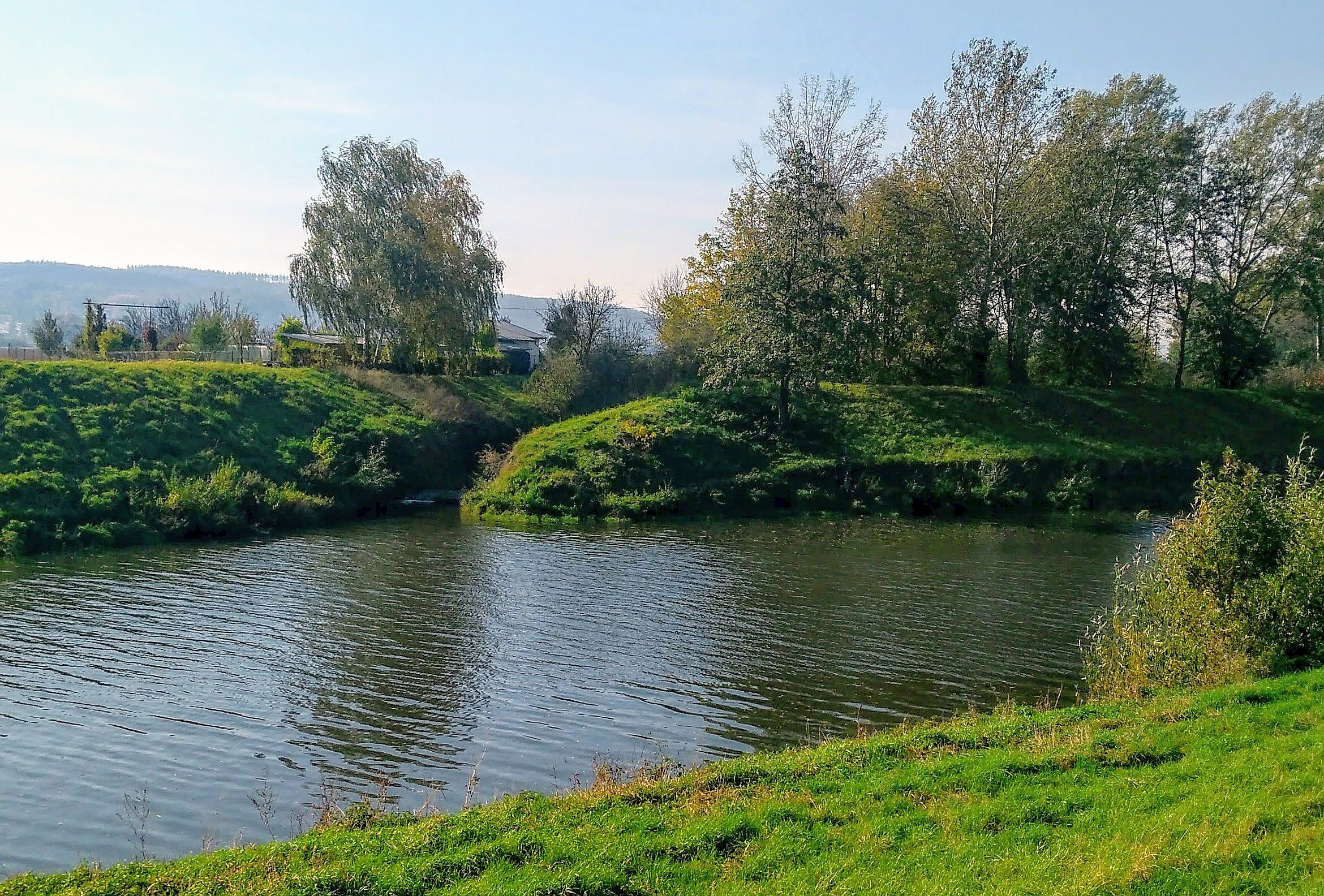 Kotojedka - ústí do řeky Moravy